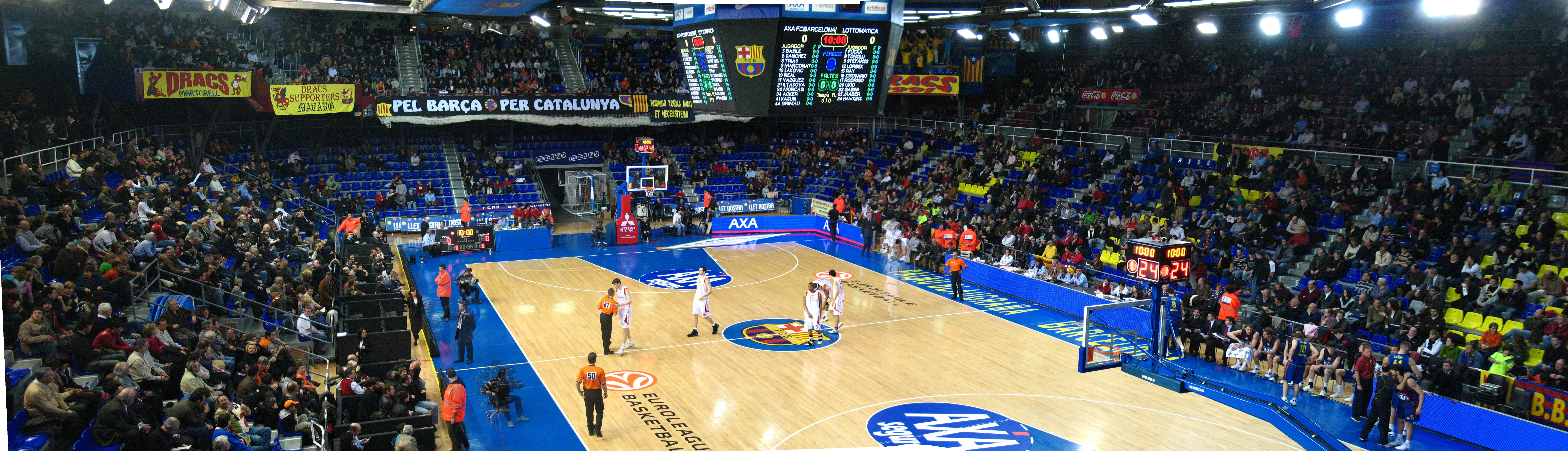 Panorámica del Palau Blaugrana sacada en un pártido entre el FC Barcelona y la Lottomatica Roma de Euroliga en Febrero de 2008